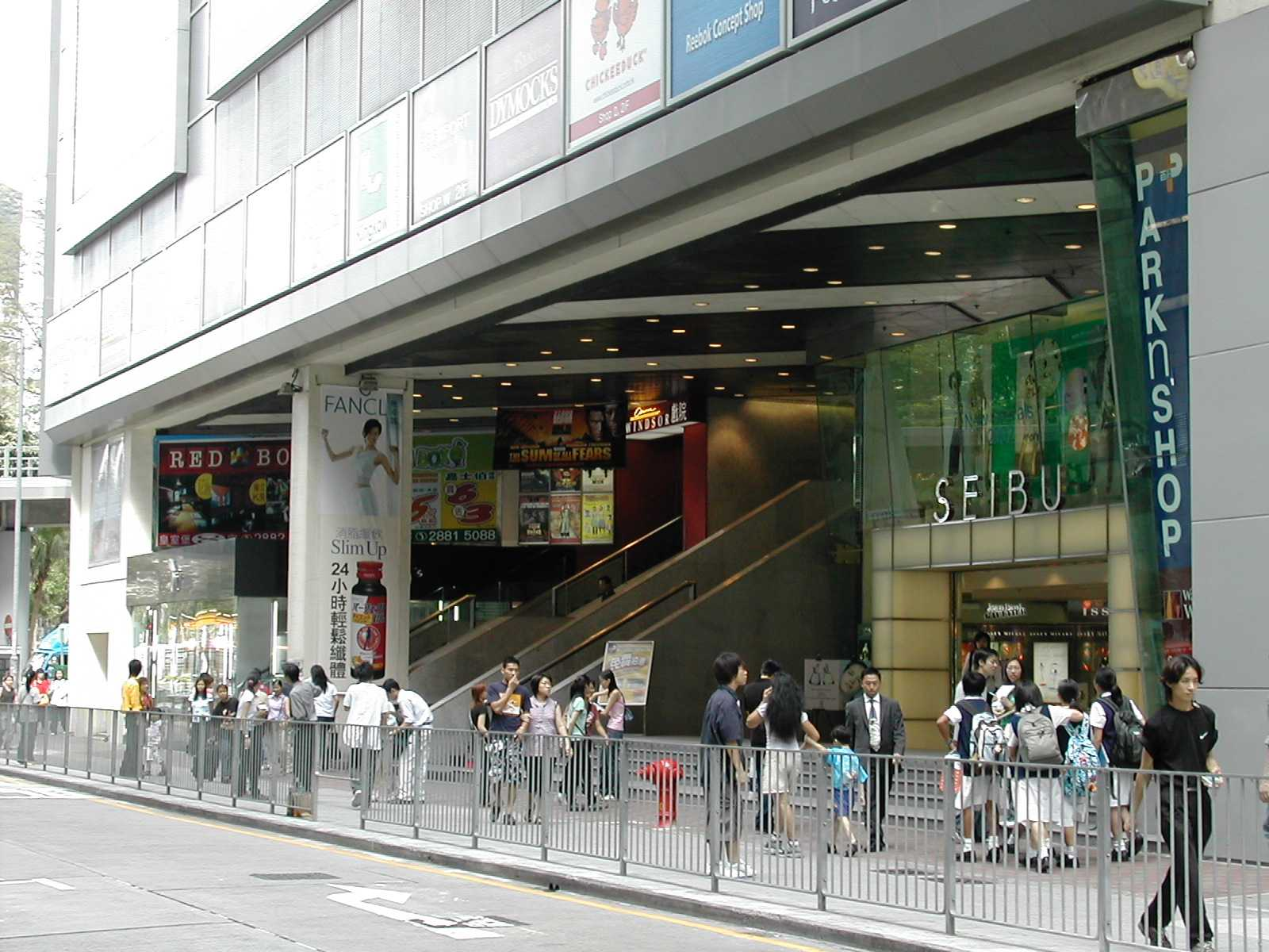 中文（香港）: 翻新前皇室堡入口